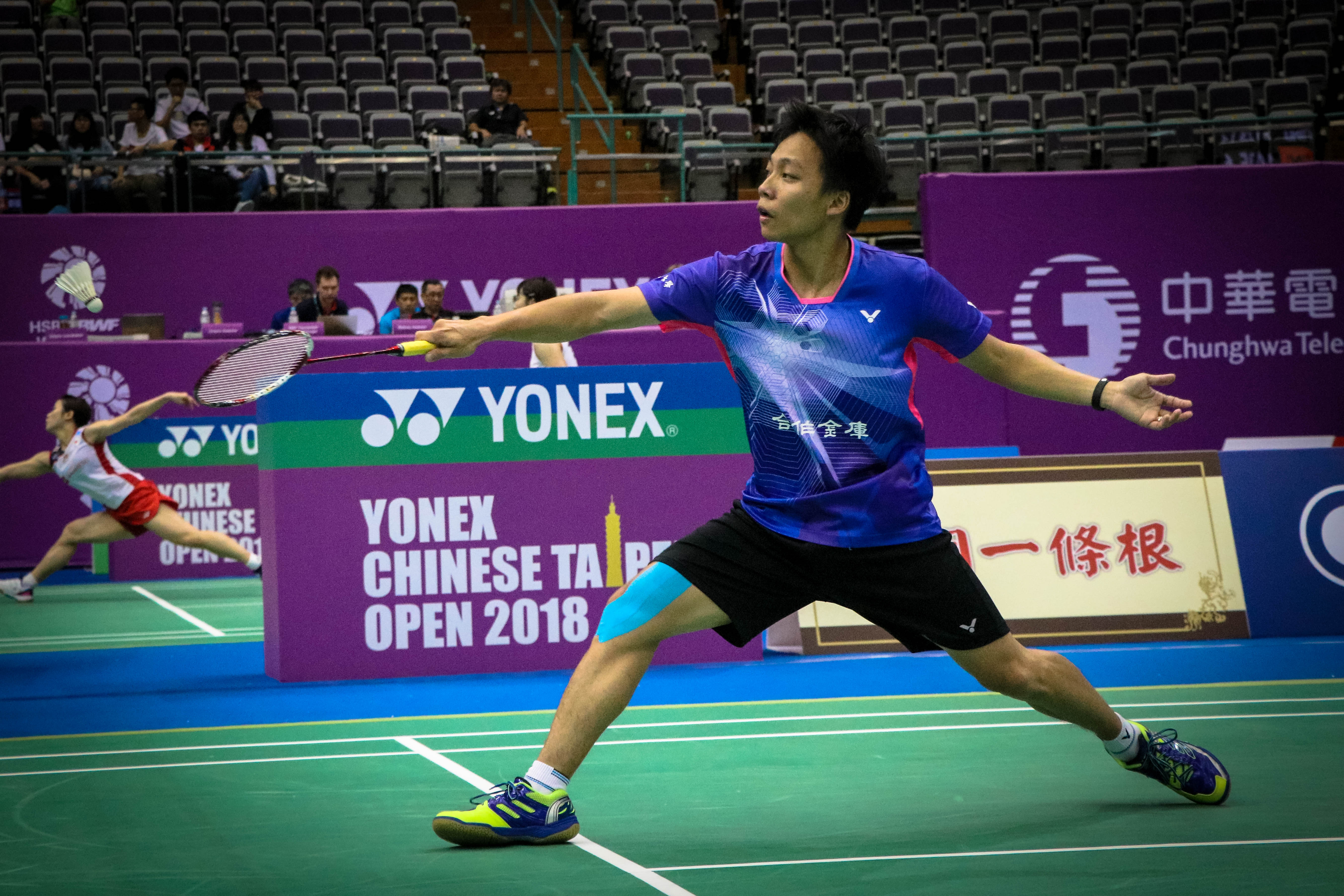 2018 台北OPEN 10/03